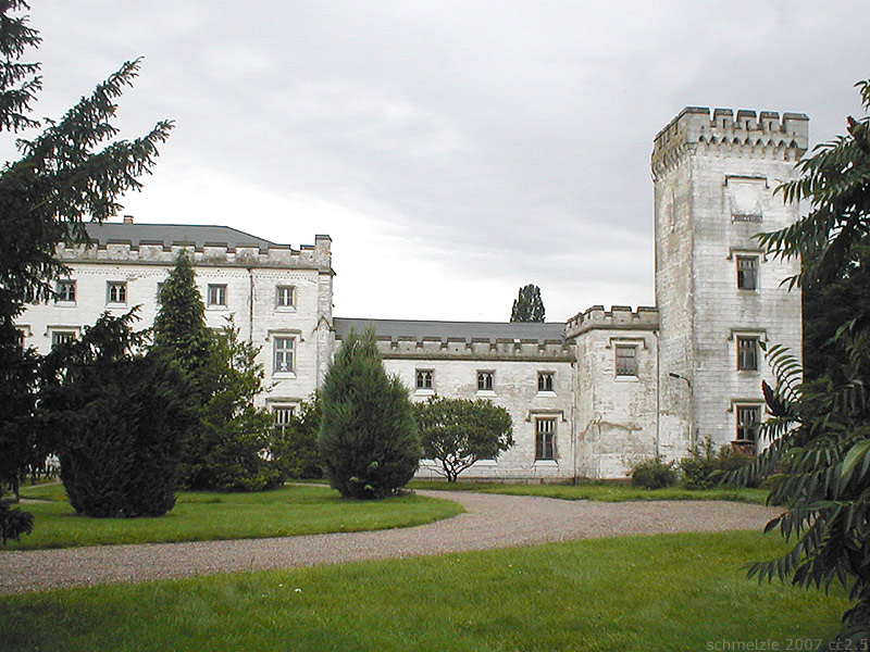 Teilansicht (Hauptbau und Nordflügel) des Schlosses in Varchentin, Landkreis Mecklenburgische Seenplatte, Mecklenburg-Vorpommern, Deutschland